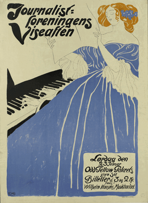 Journalistforeningens Viseaften Tema: TEATER.FILM